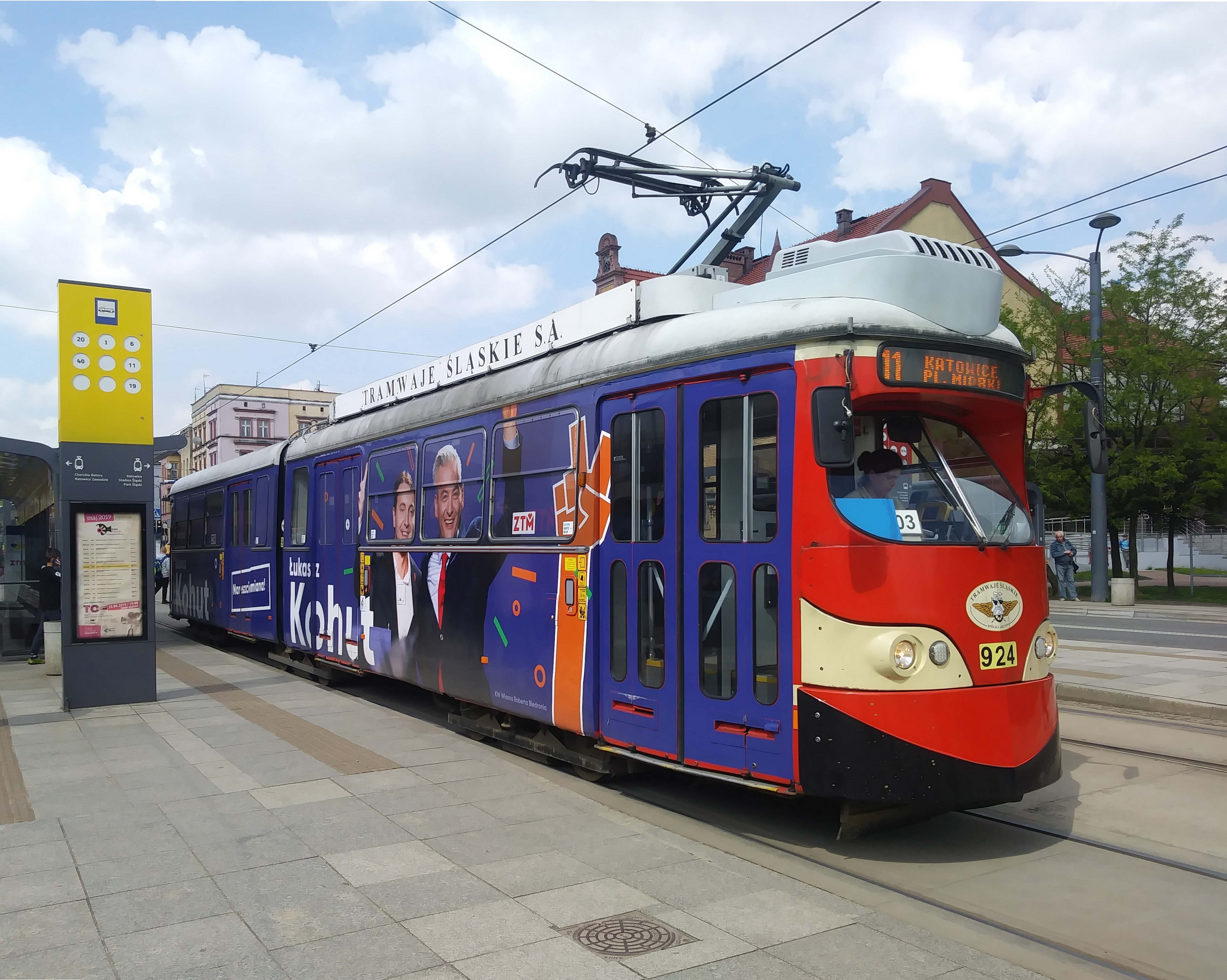 tramwaj linii 11 na przystanku Chorzów Rynek w Chorzowie z wizerunkiem Łukasza Kohuta i Roberta Biedronia, z KW Wiosna Roberta Biedronia przed wyborami do Parlamentu Europejskiego